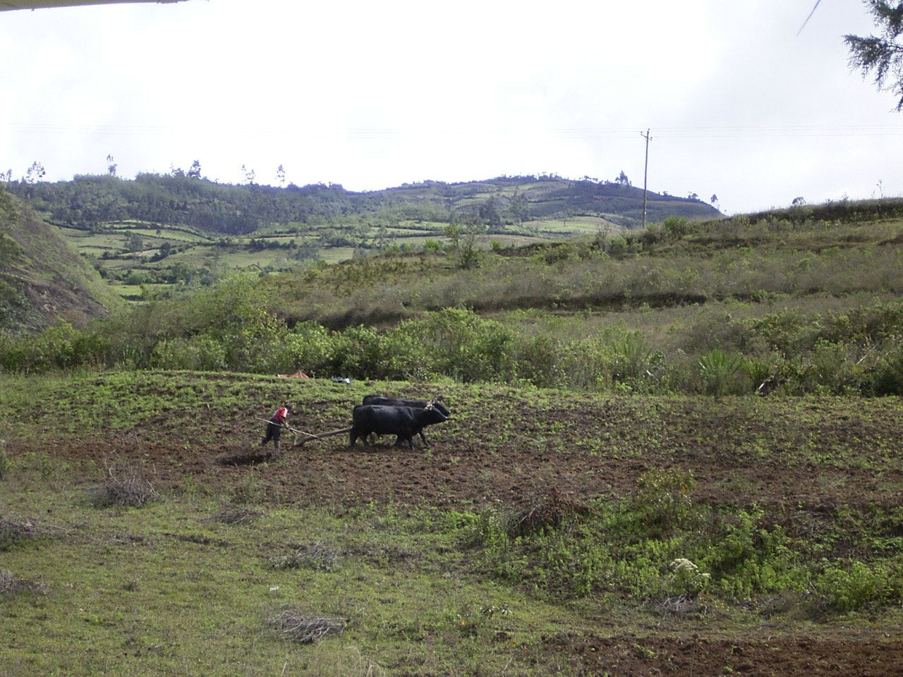 Un campesino trabaja en su chacra cerda del pueblo Leymebamba, Provincia de Chachapoyas, Amazonas, Peru.